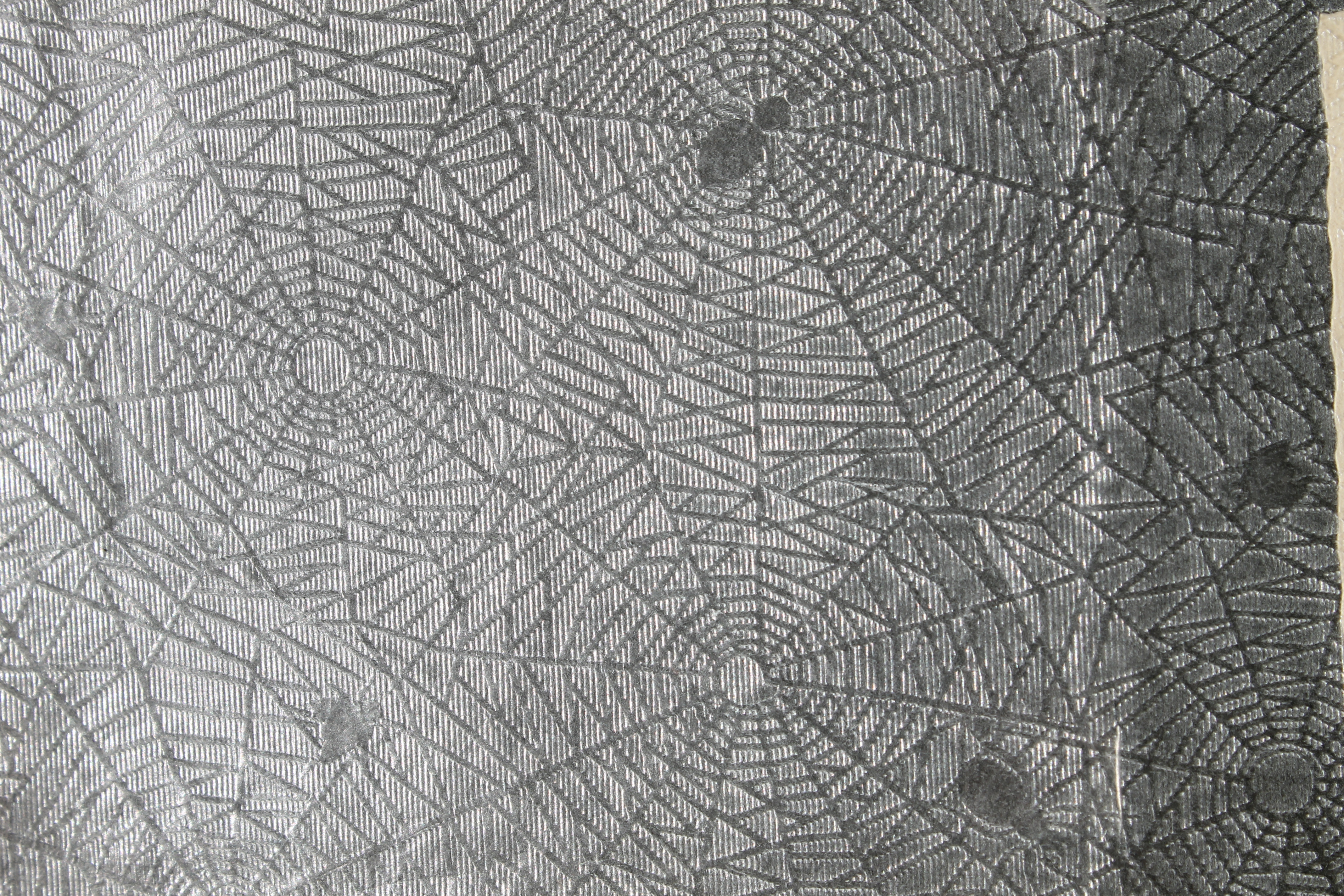 Spinnenpapier (Detail)